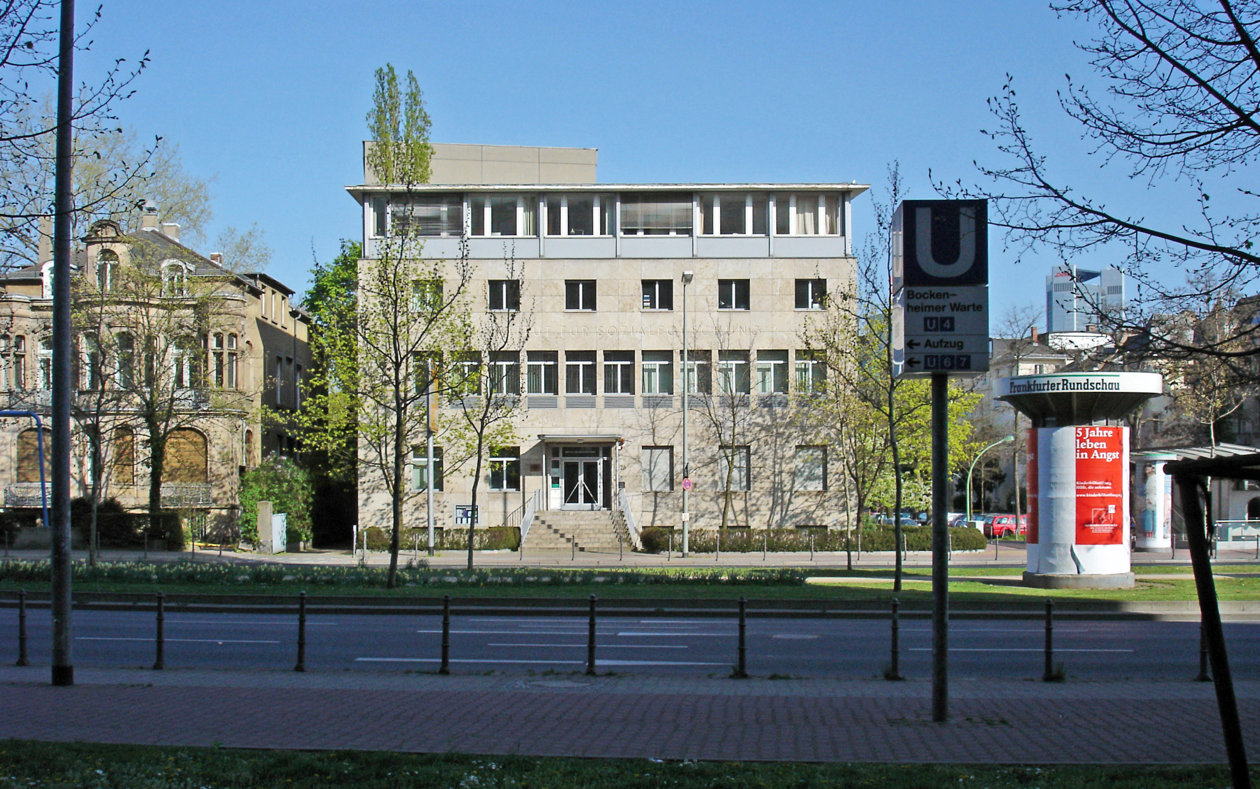 Institut für Sozialforschung in Frankfurt am Main, Senckenberganlage 26; erbaut 1951 durch die Architekten Hermann Mäckler und Alois Giefer; unter Denkmalschutz